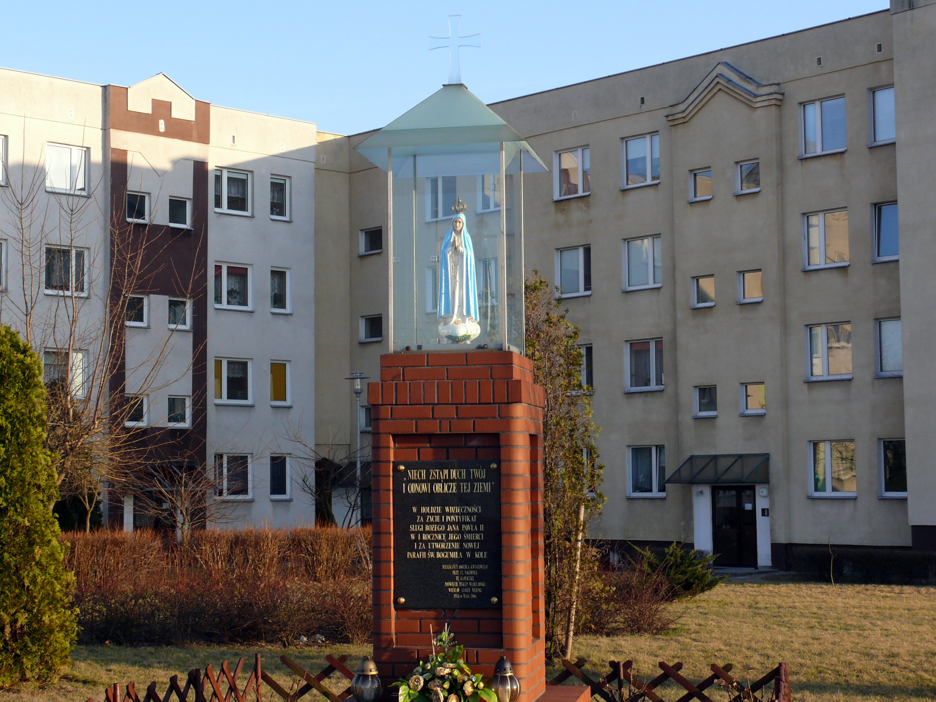 Kaplica MB Fatimskiej na osiedlu Nagórna w Kole